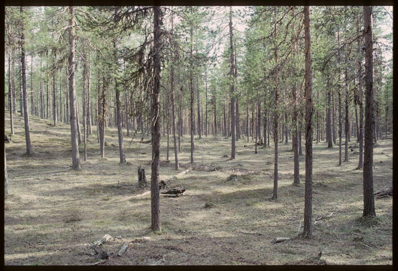 Arjeplog 979:1. Boplats bestående av härdar och kokgrop. Motiv: Arjeplog 979:1 Kategori: Boplats Arjeplog 979:1. Boplats bestående av härdar och kokgrop.